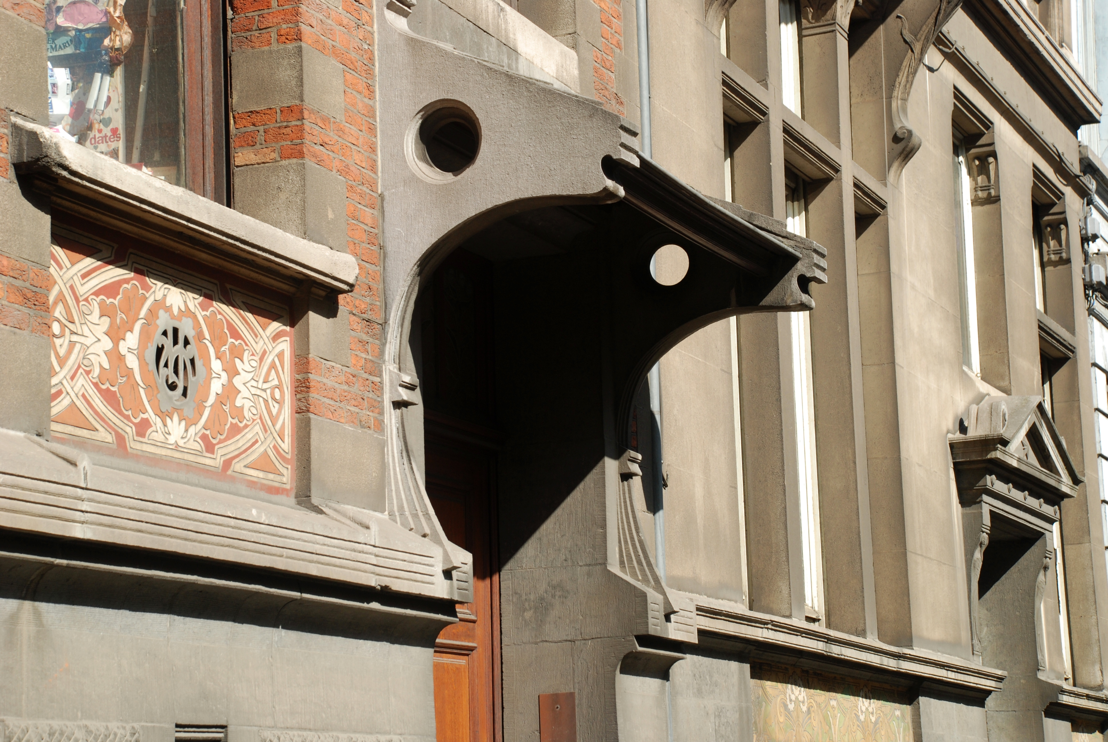 Belgique - Bruxelles - Maison Henri Jacobs